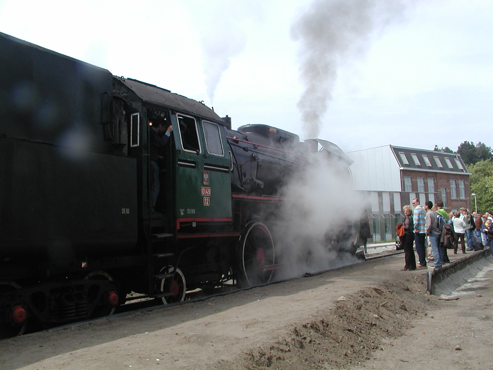 Lokomotivo Ol49-12 dum Vaporfestivalo en Maldegem, Belgio.